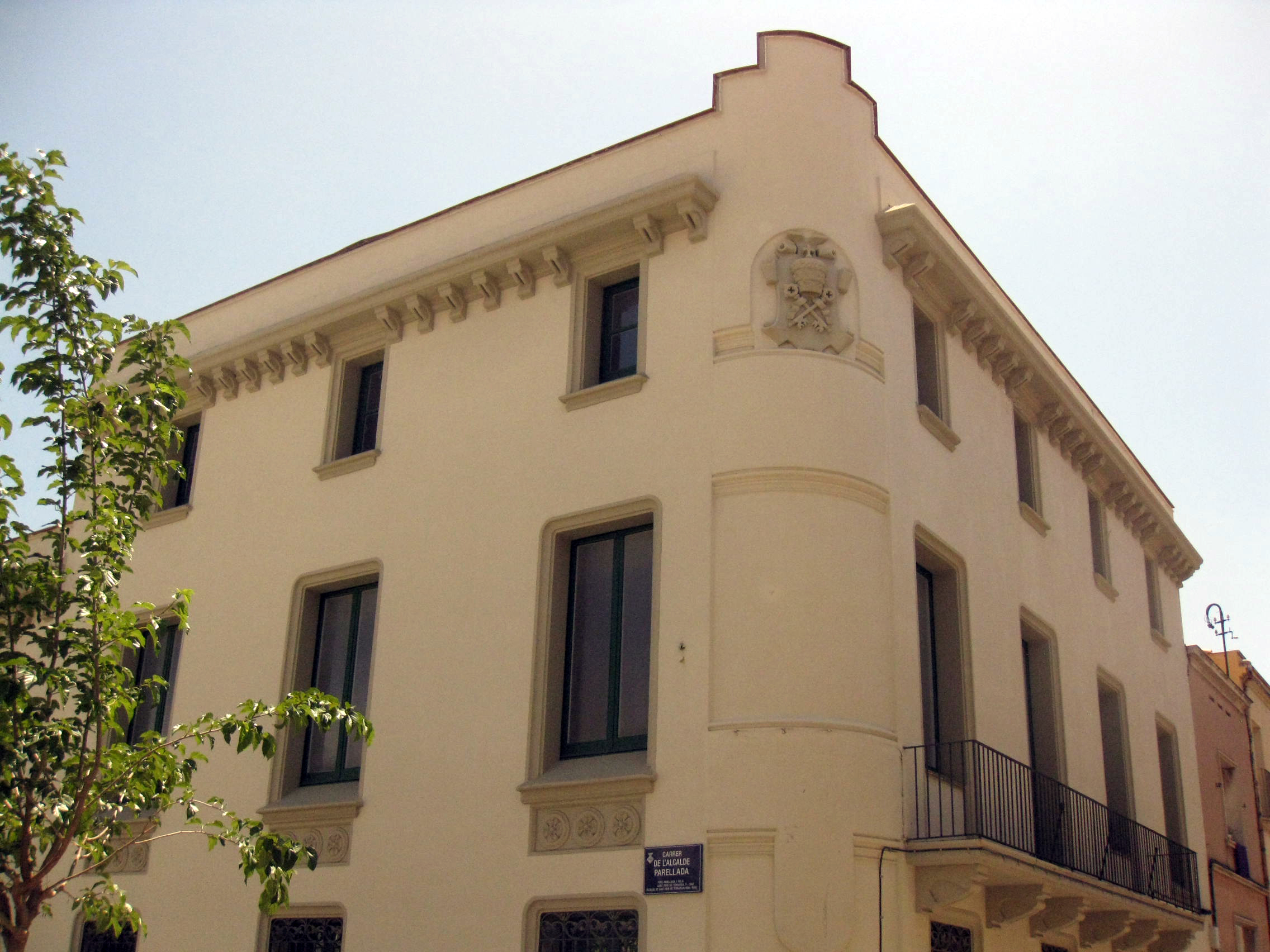 Antic ajuntament de Sant Pere, actualment local social del barri, al carrer Major de Sant Pere núm. 20 (Terrassa). Edifici modernista historicista de començament del segle XX. Vista de la cantonada entre els carrers de l'Alcalde Parellada i Major de Sant Pere.